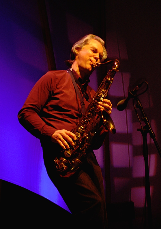 Jan Garbarek